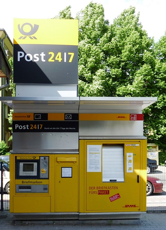 Post 24/7 Stadion mit Briefmarkenautomat, Briefkasten und Paketbox der Deutschen Post DHL in Berlin, Nähe Tempelhof, auf dem Parkplatz von Aldi Nord